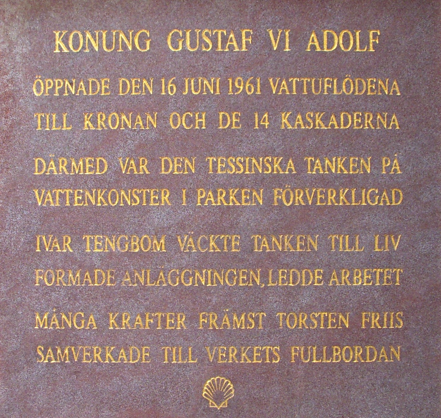 Minnestavla vid Kaskaderna i Drottningholms barockpark